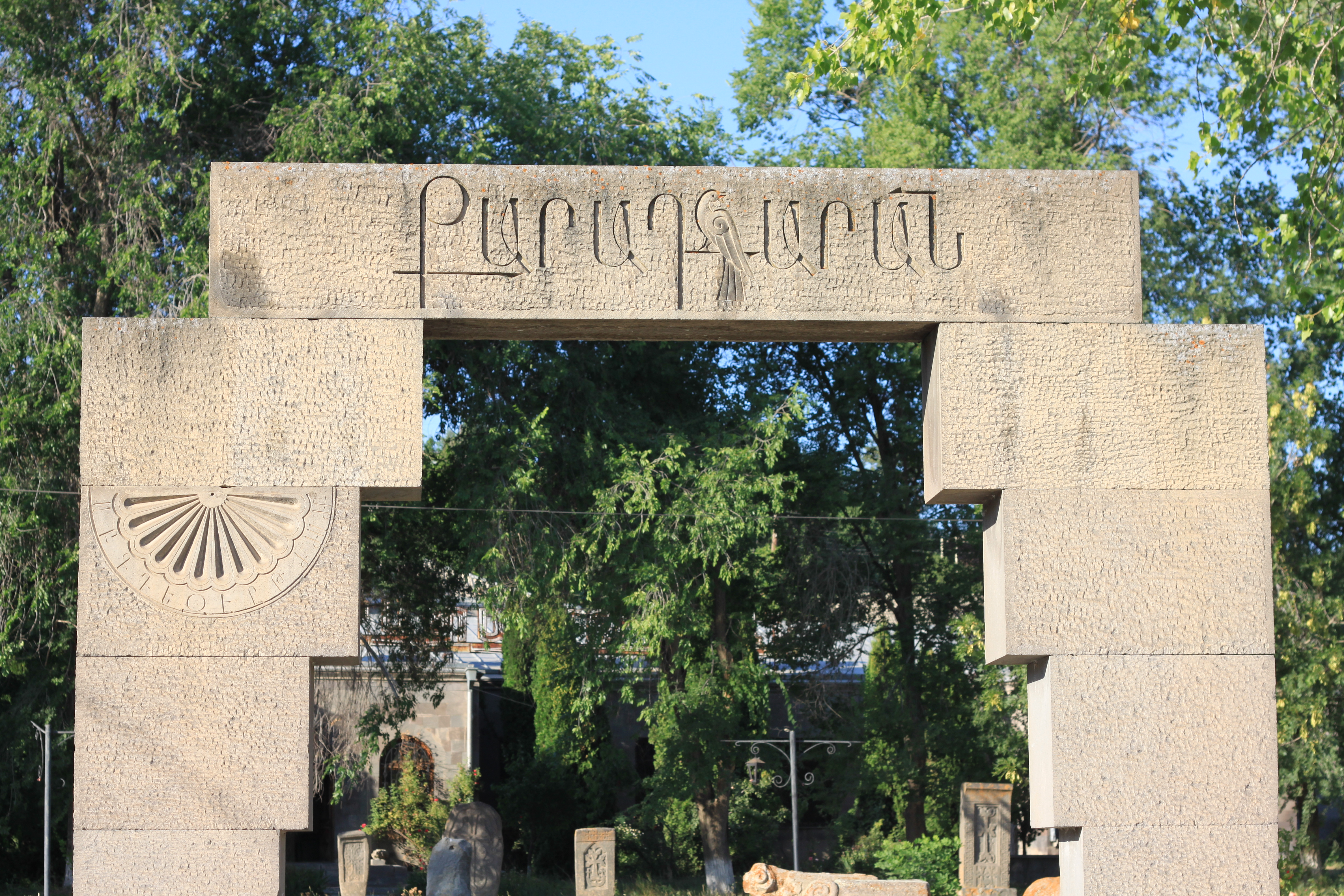 Սիսիանում գտնվող քարադարանի մուտքը 6/32